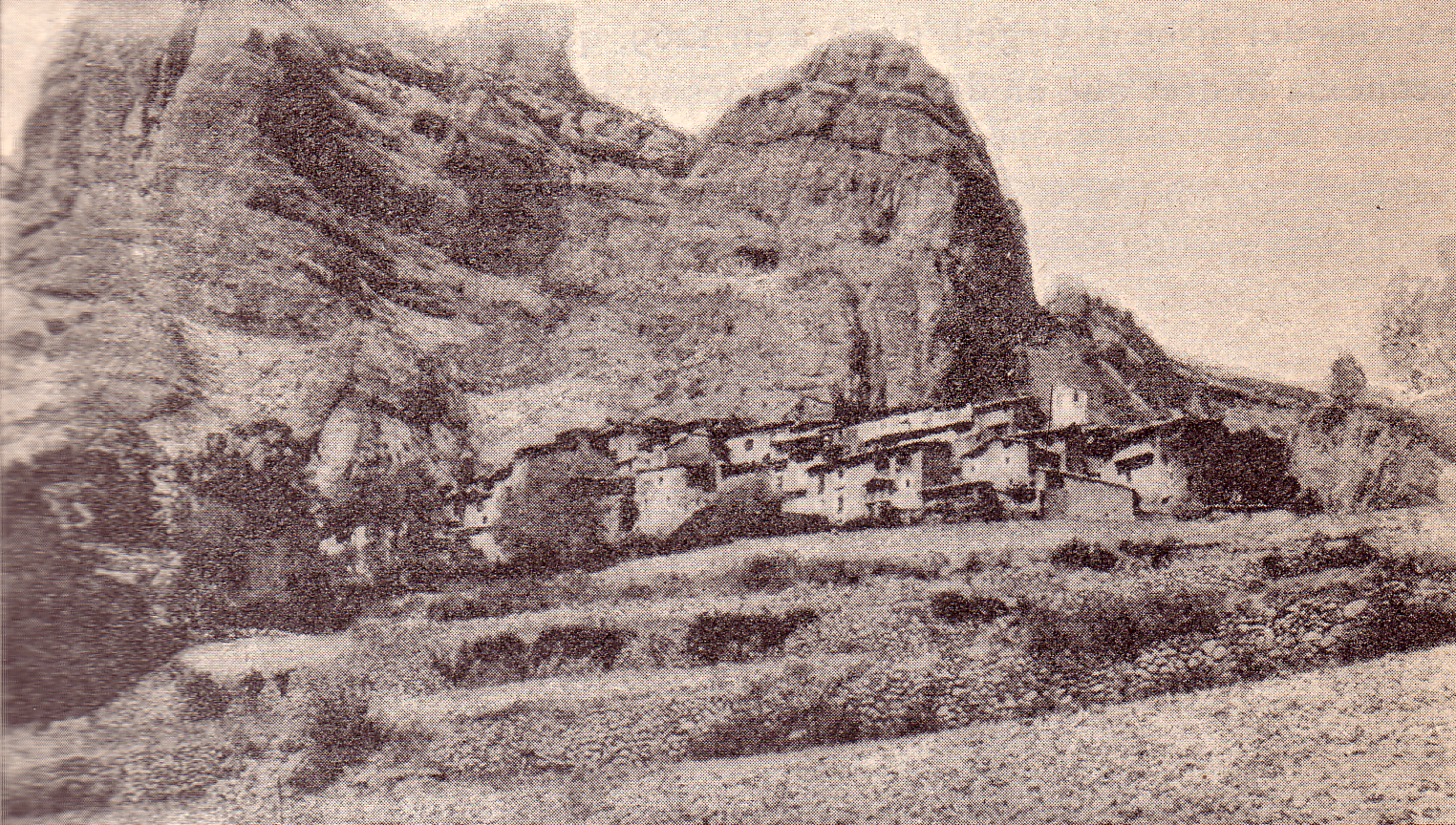 El poble de Serradell vers el 1912 (Conca de Dalt, Pallars Jussà)